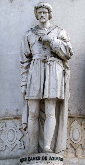 Estátua de Gomes Eanes de Azurara, parte do pedestal do Monumento a Luis Vaz de Camões da autoria de Victor Bastos, entre 1860 e 1867, Praça Luís de Camões (Lisboa).